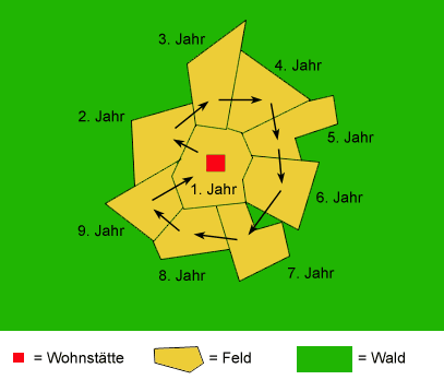 Beispielhafte Zyklen einer typischen Landwechselwirtschaft in den Tropen